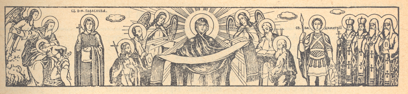 Образ Покрова и святые, графическое оформление Календаря 1939 года работы Киприана Пыжова